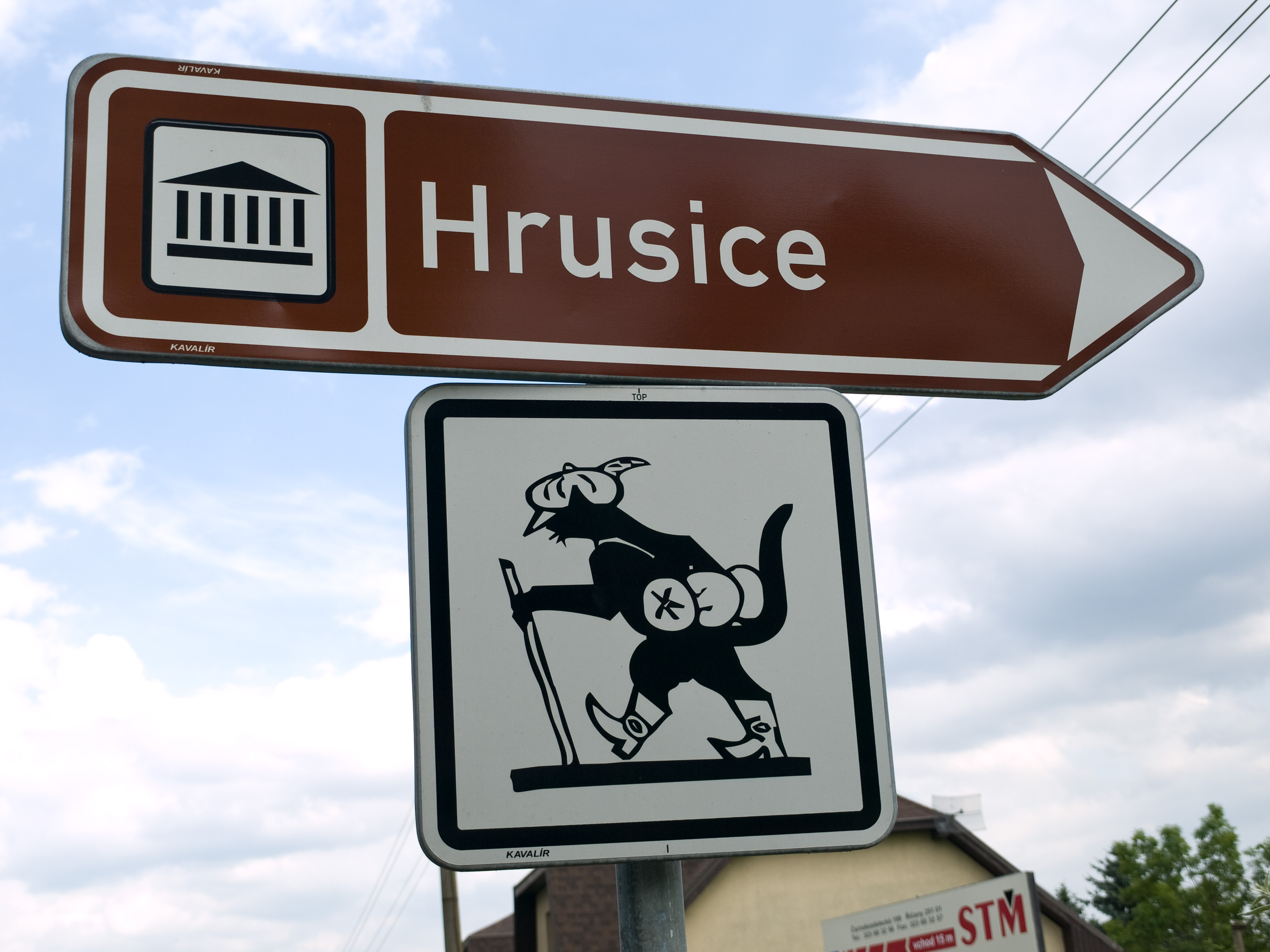 Směrovka v Říčanech s kresbou Ladova kocoura Mikeše, ukazující směr do Hrusic